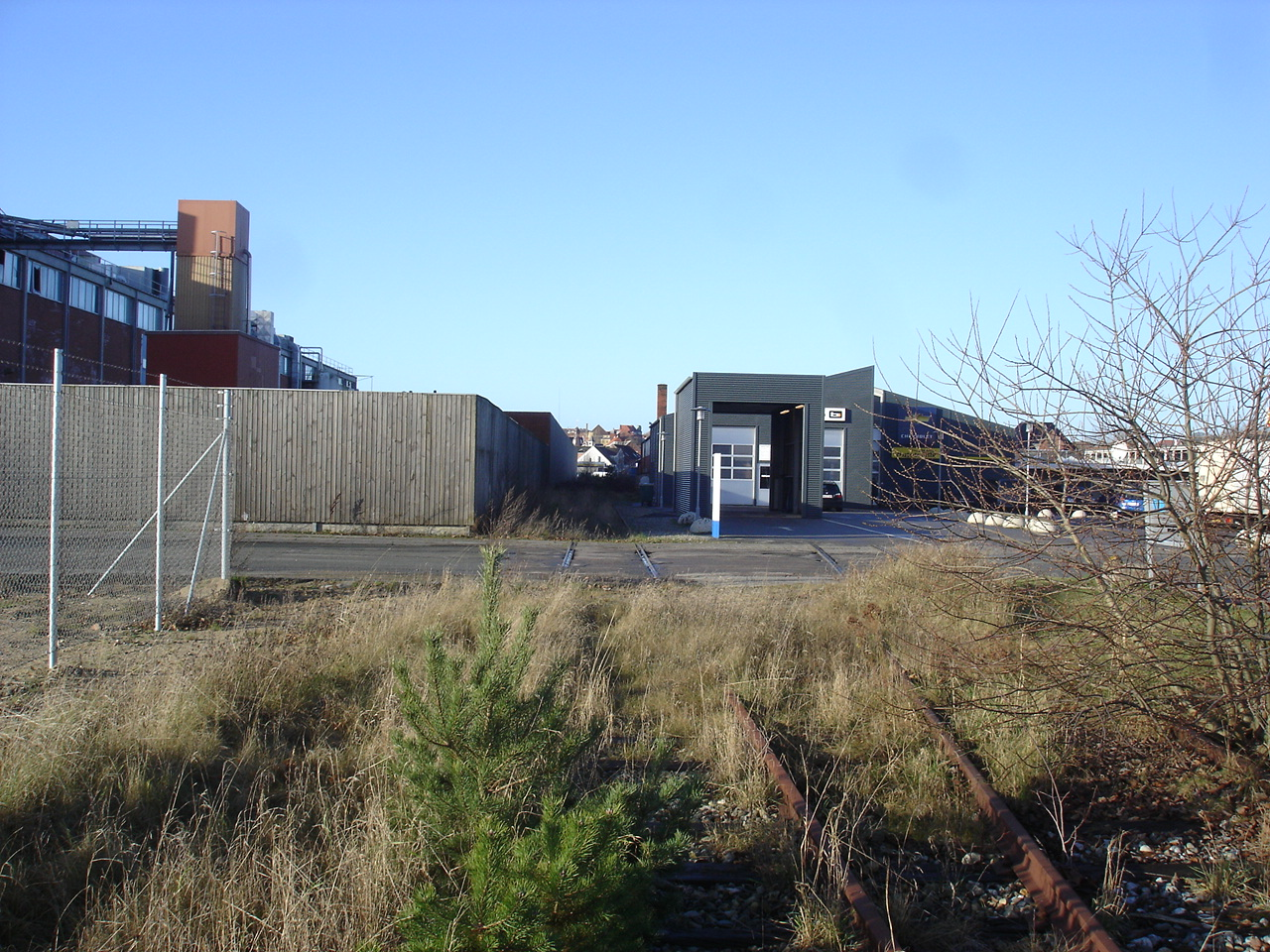 Skive Havnebane krydser Færøvej